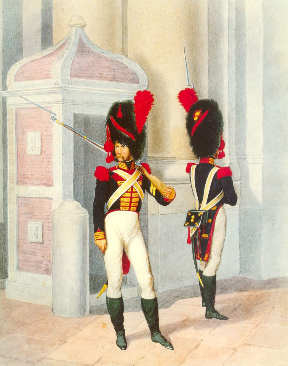 Fantassins de la Garde royale napolitaine en faction. Estampe d'époque.